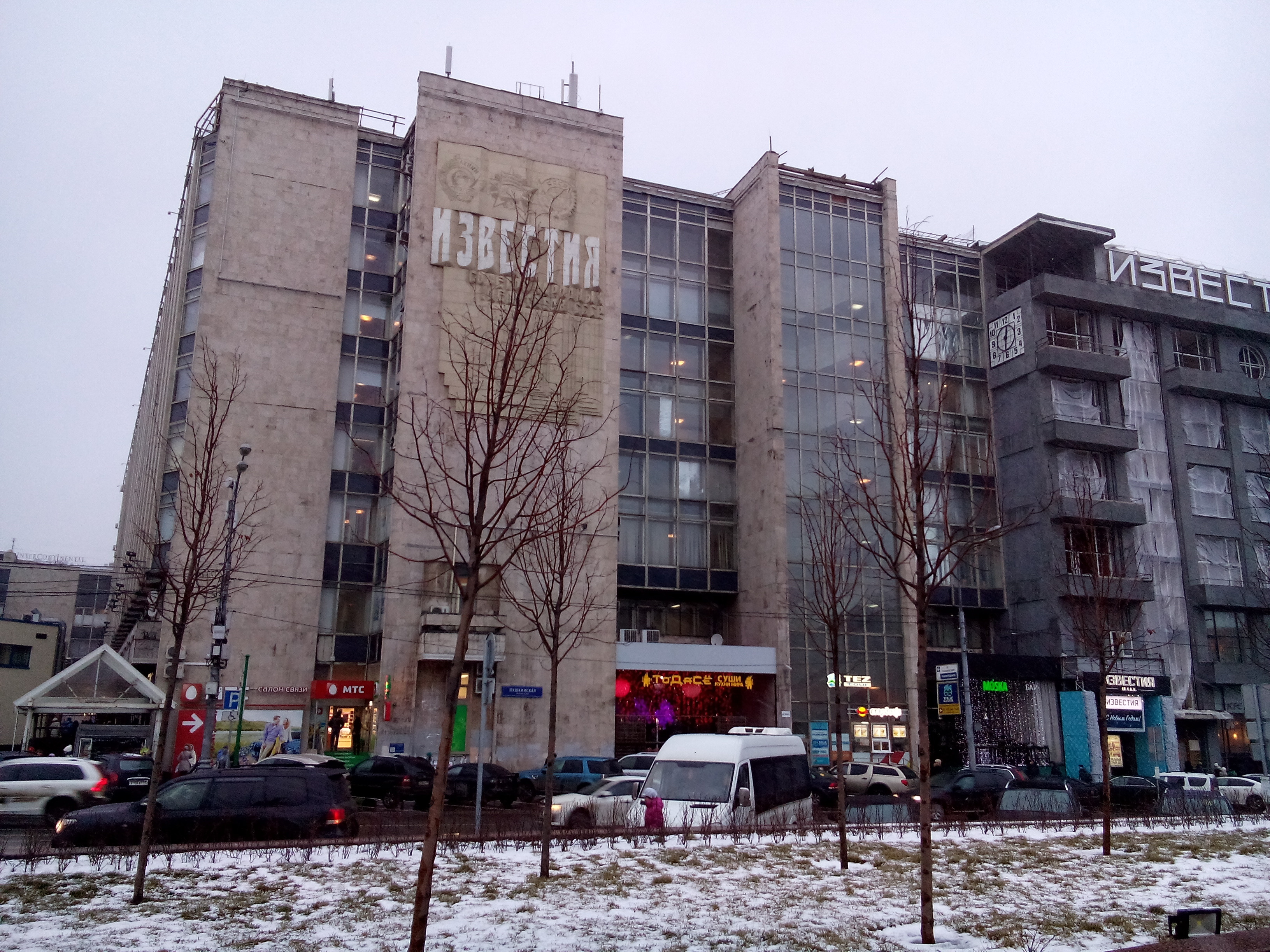 Пушкинская площадь, Москва